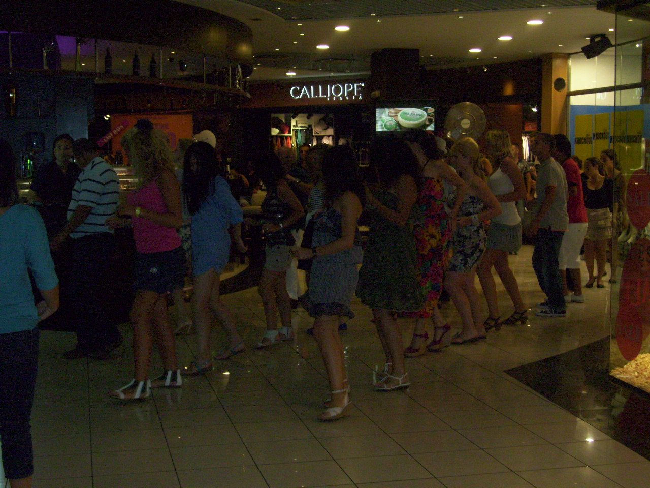 Una balera notturna all'aperto